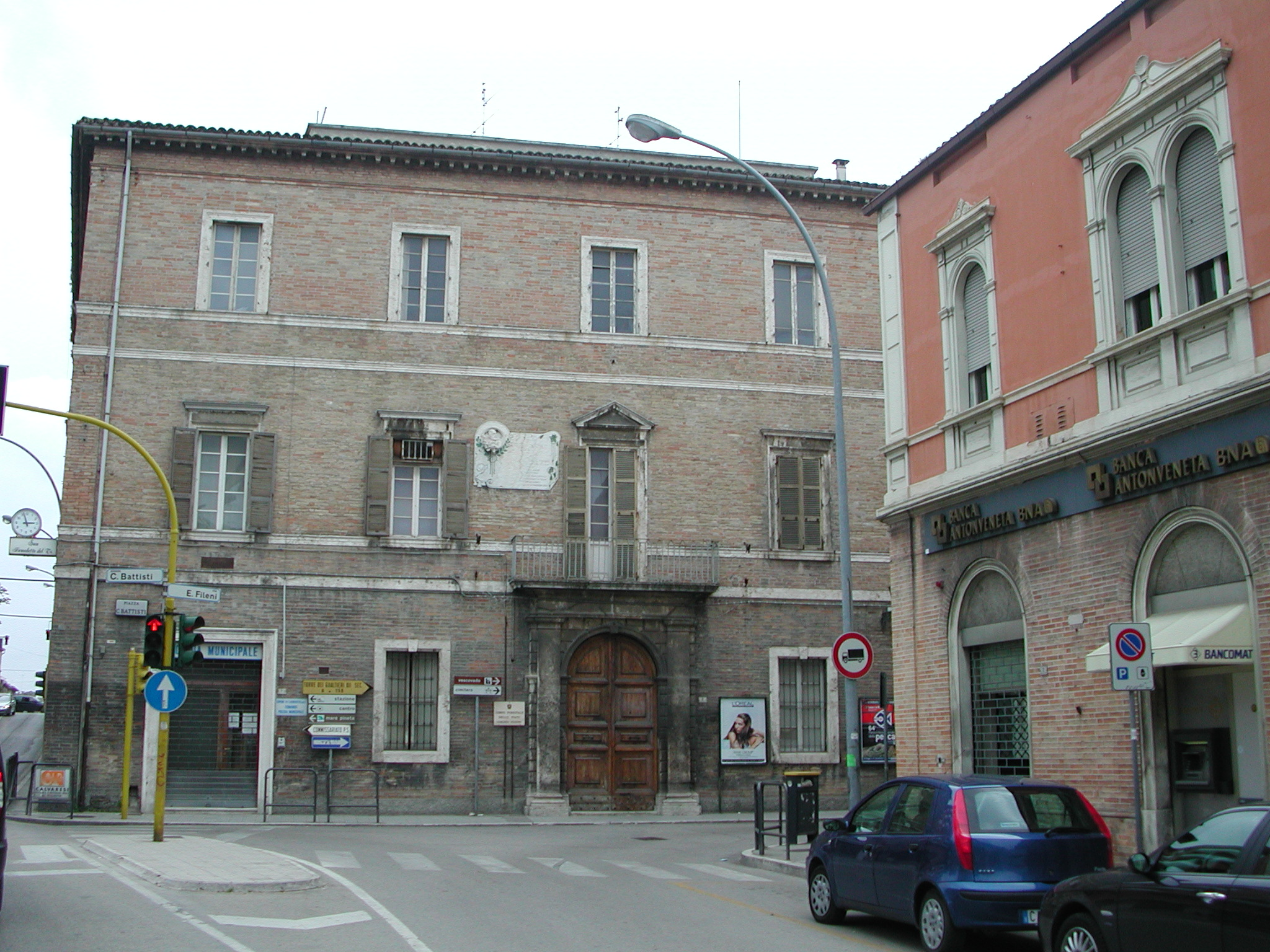 Vecchia Sede Municipale, San Benedetto del Tronto